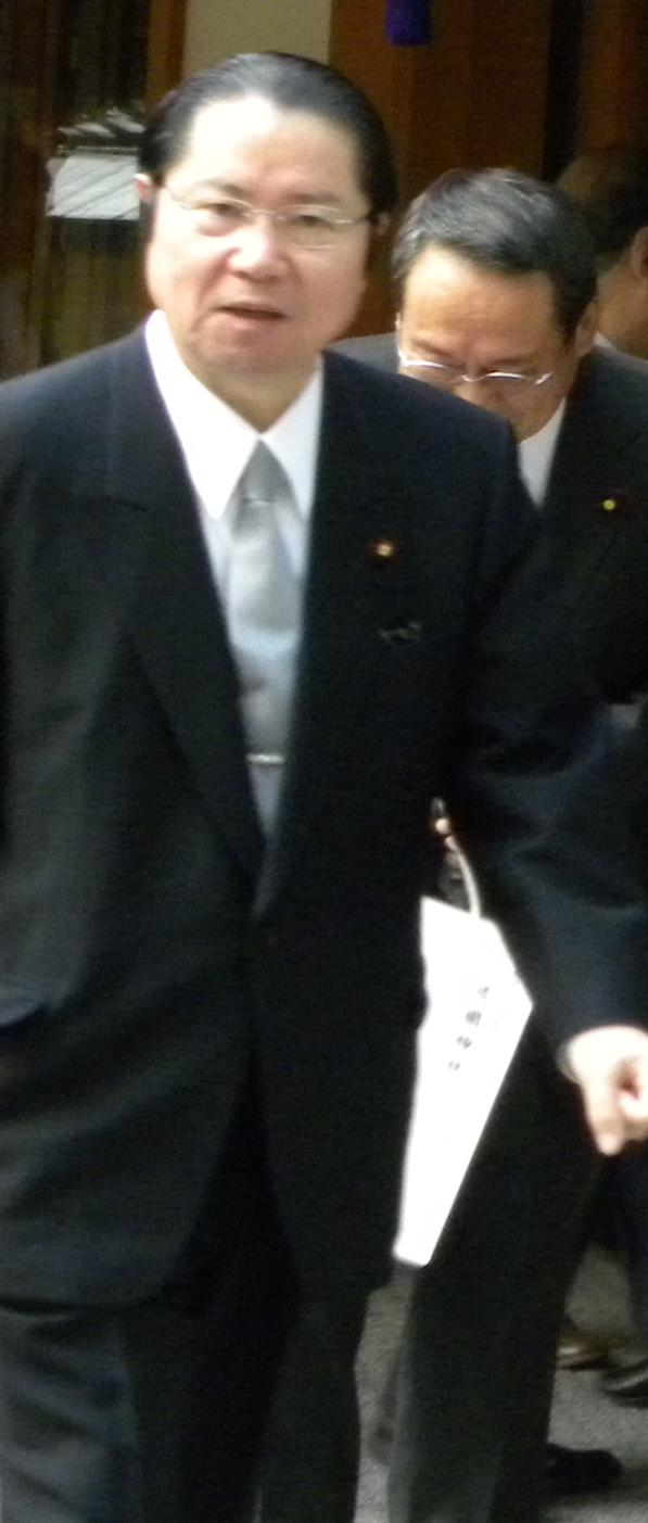 靖国神社での衛藤征士郎